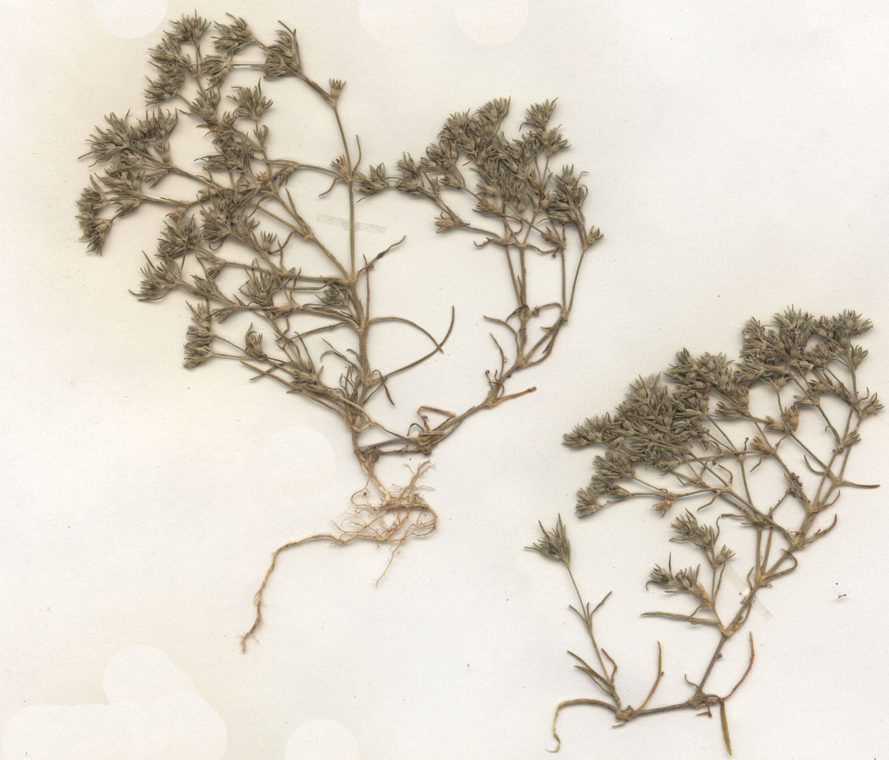 Scleranthus annuus, eigener Herbarbeleg von 1983, Unterfranken